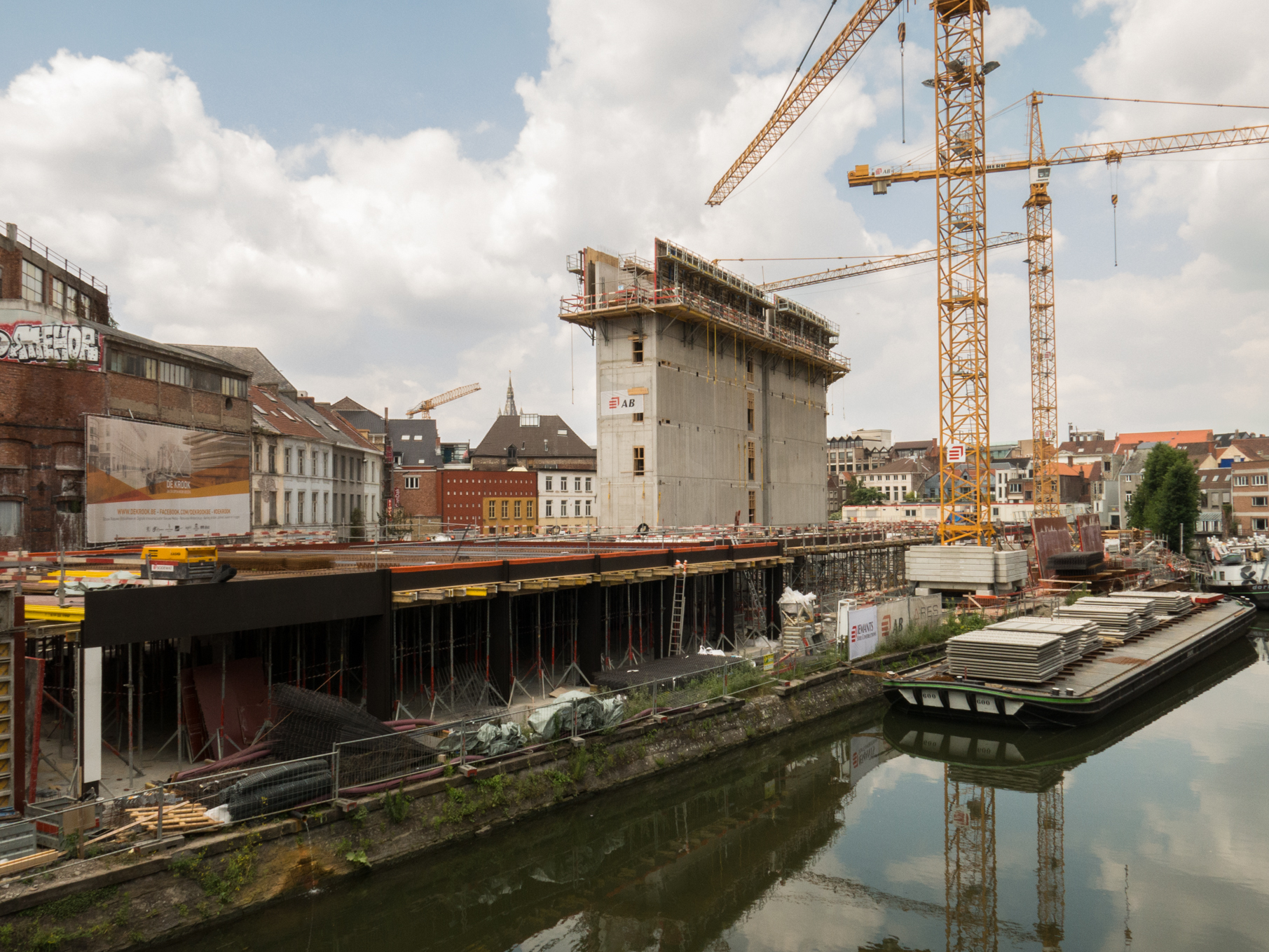 De Krook